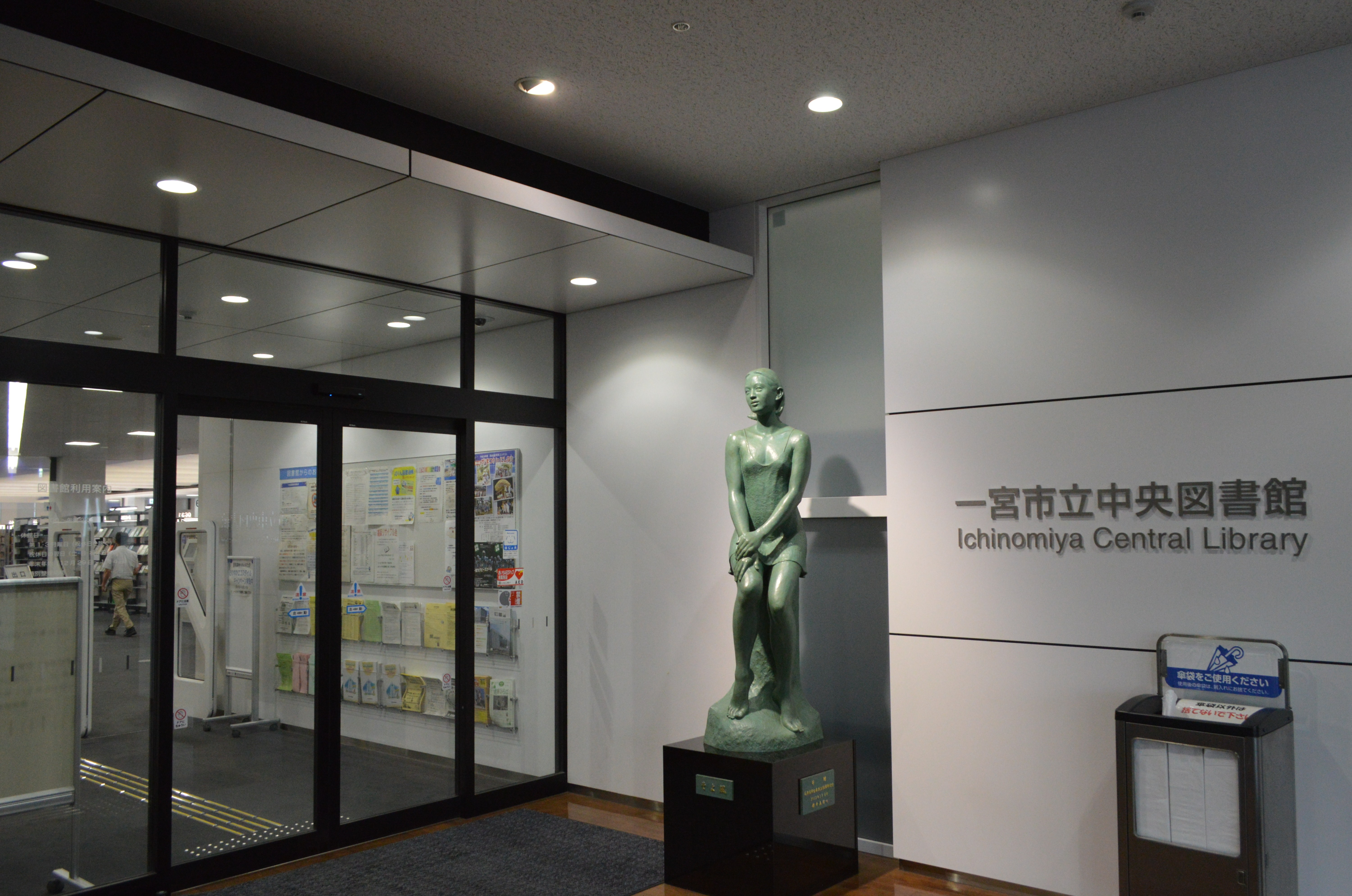 愛知県一宮市 尾張一宮駅前ビル（i-ビル）内にある一宮市立中央図書館入口